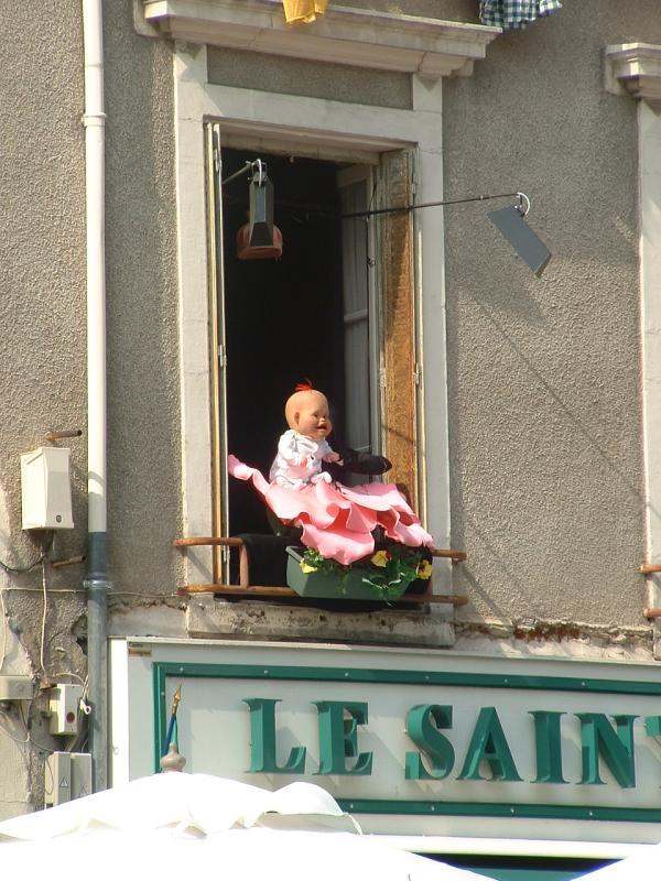 chalon dans la rue, photo J.F. Gaffard, juillet 2004